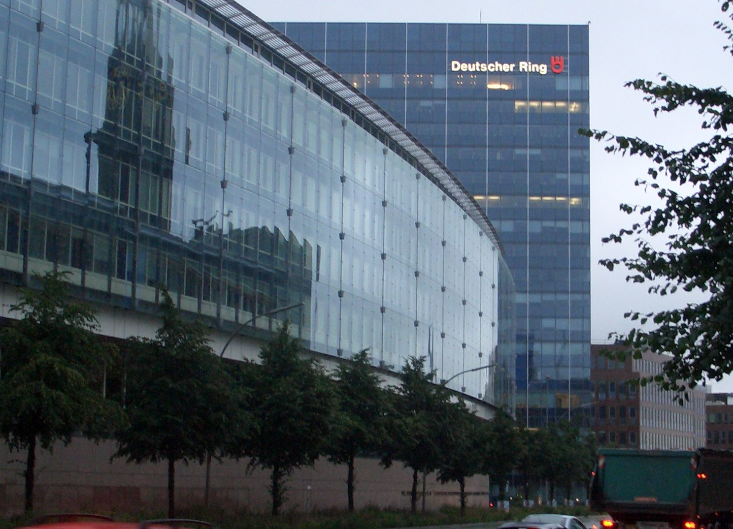 Hauptverwaltung des Deutschen Ringes in der Hamburger Neustadt. In der Glasfassade spiegelt sich der Michel